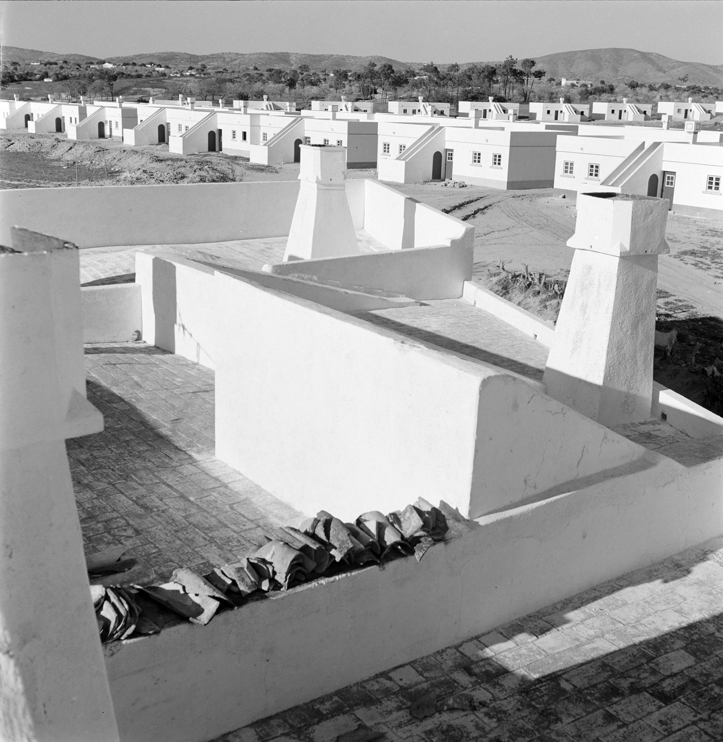 Olhão, Algarve, Portugal Bairro do Consórcio Português de Conservas de Peixe. Arquiteto responsável: Eugénio Correia. Projeto / Construção: 1935-1938. Fotógrafo: Estúdio Horácio Novais. Data de produção da fotografia original: pós 1938. [CFT164.102207.ic]